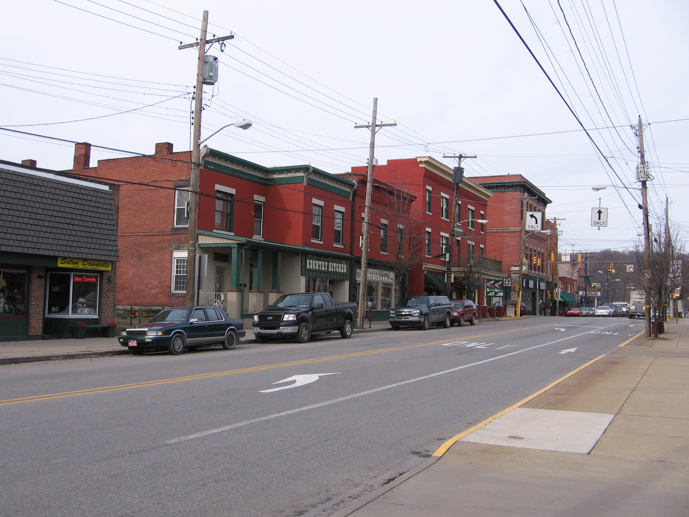 Zelienople, Pennsylvania